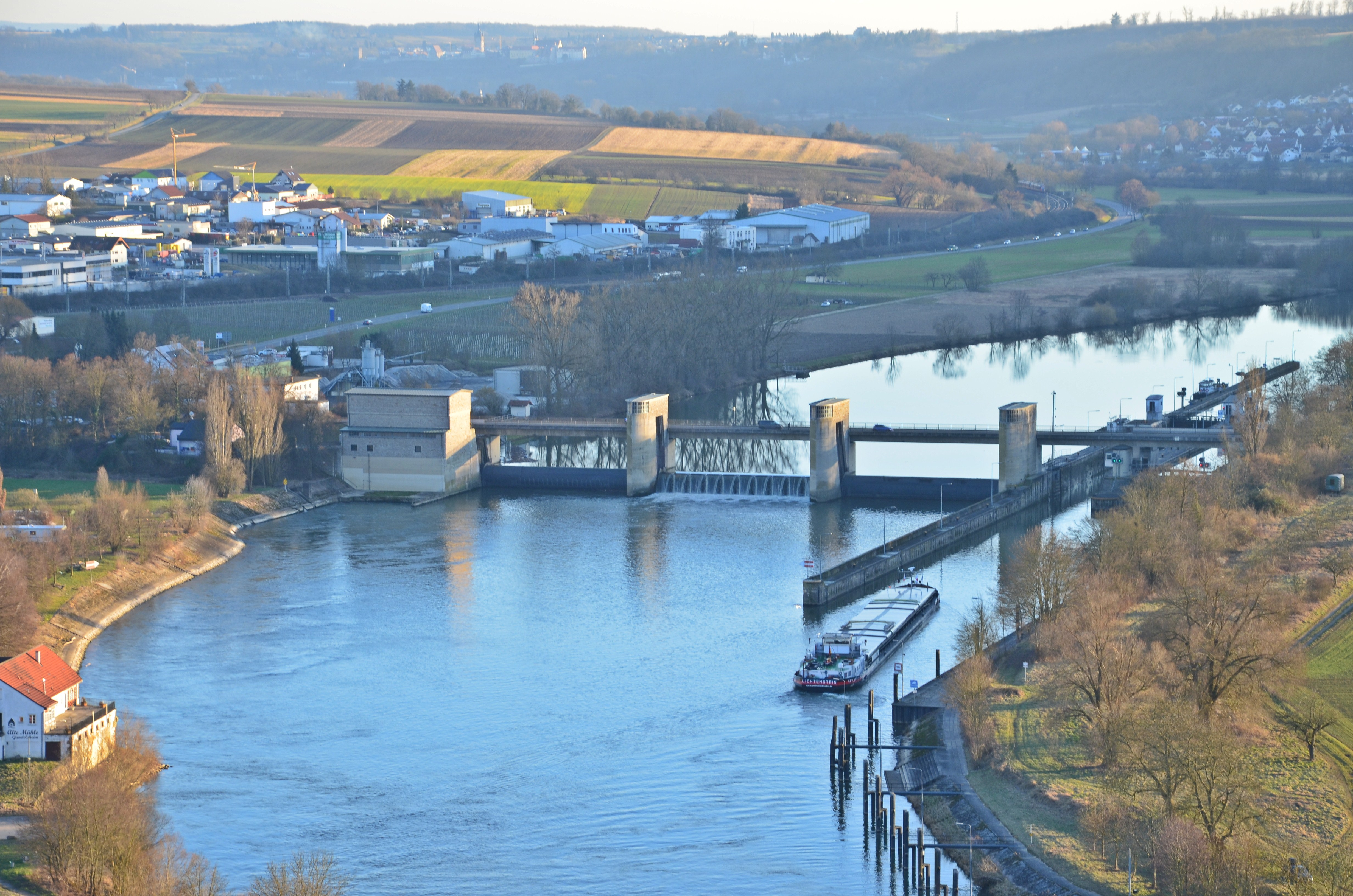 Gundelsheimer Schleuse